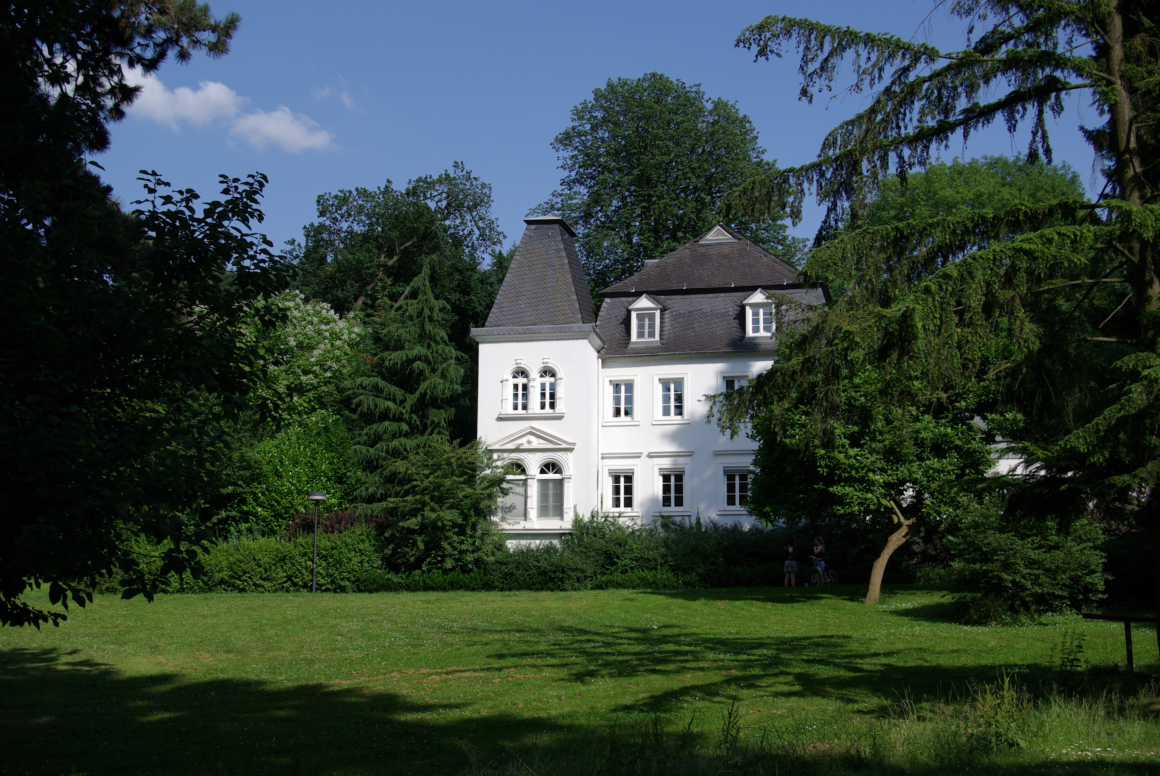 Trier, Kürenzer Schlösschen, ehem. Gutshof, Anfang des 19. Jh. vom Präfekt des Saardépartements Alexandre François Bruneteau de Sainte Suzanne gebaut, Turm Neurenaissance 1887 *